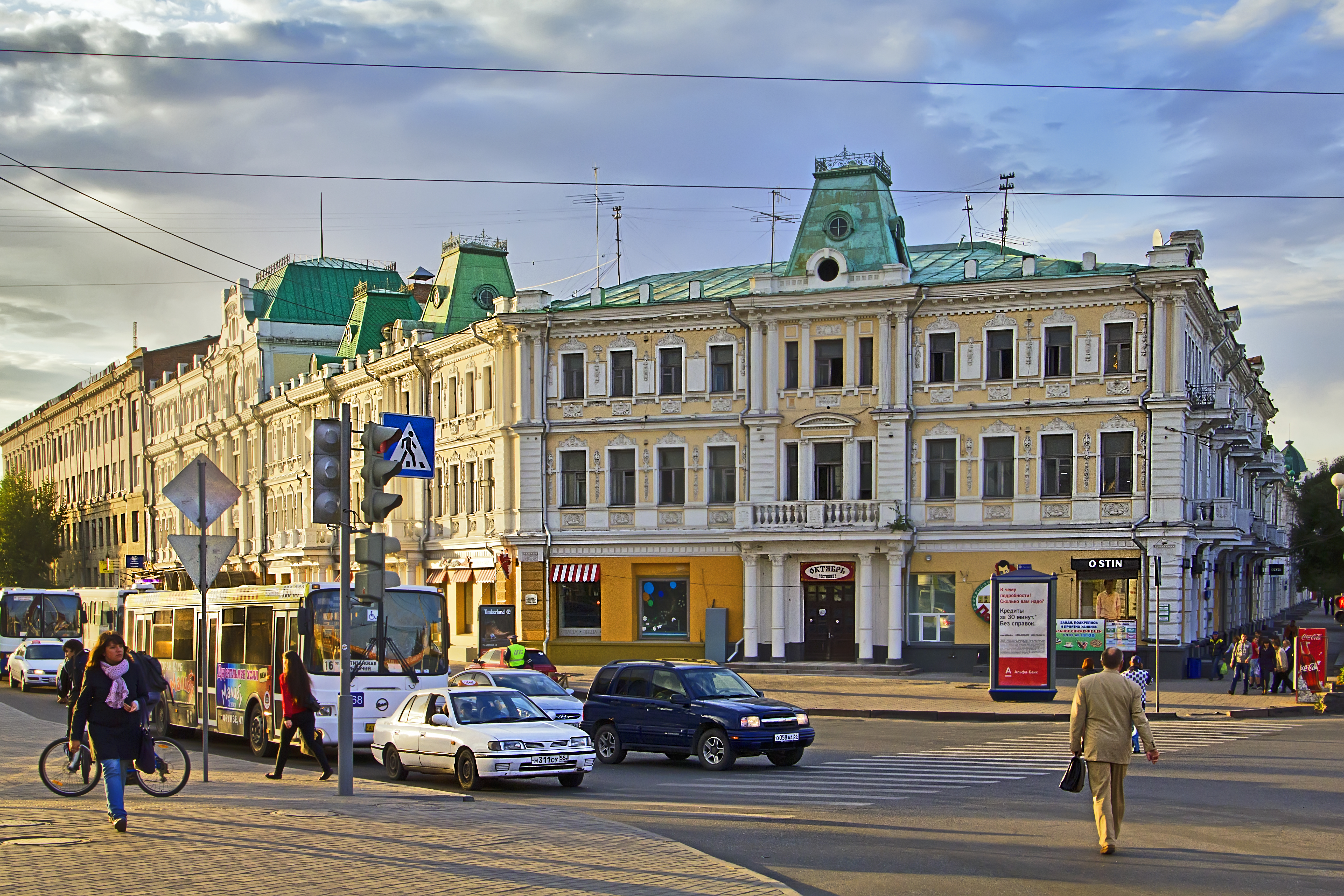 Гостиница «Россия» (Омская область, Омск, улица Ленина, 18, Партизанская улица, 2)